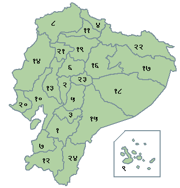 से अनूदित चित्र। División política del Ecuador